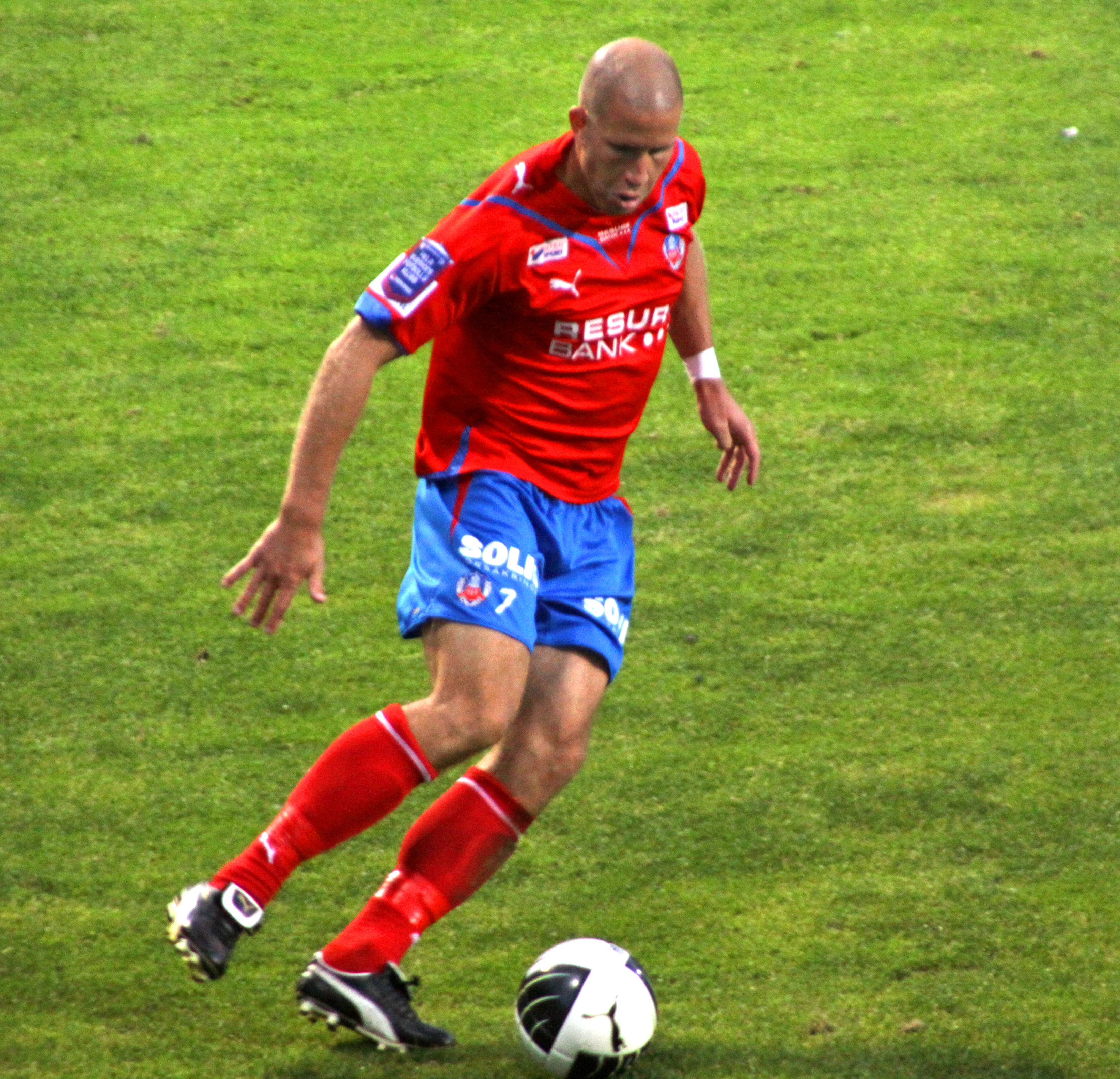 Helsingborgs IF player Mattias Lindström.